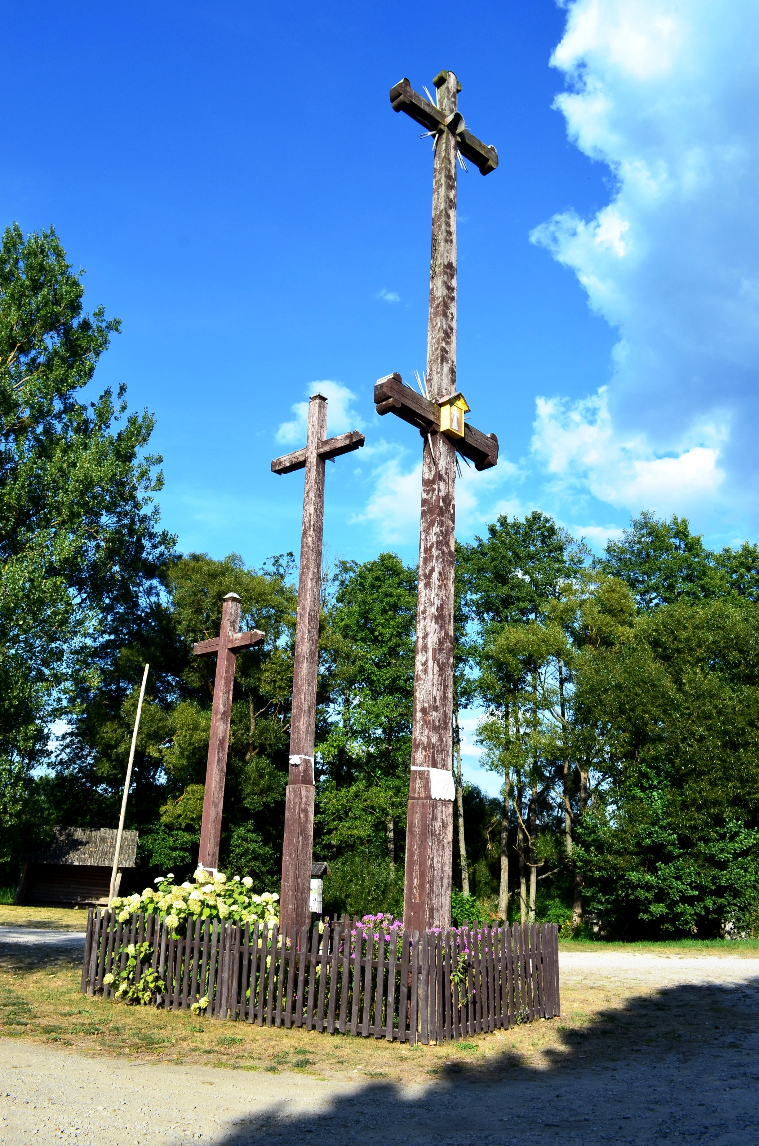 Kryžiai, Musteika, Varėnos r.